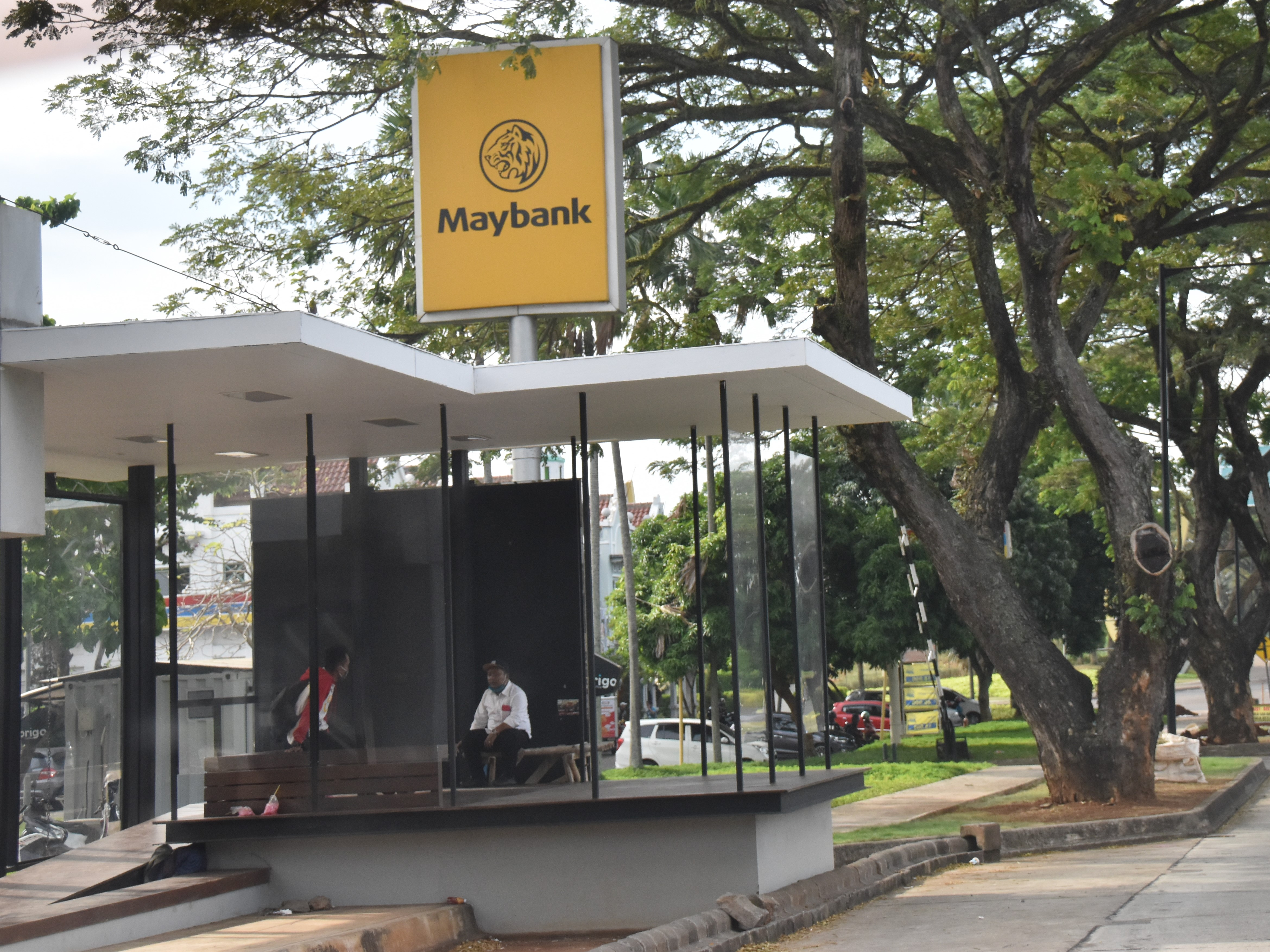 Transit F4 dan K4 (Tawang)